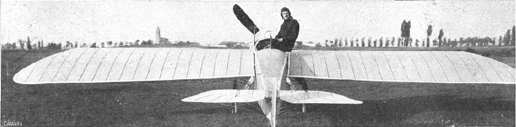 Fotografía del ingeniero y aviador español Heraclio Alfaro y su aeroplano publicada en 1914 con motivo de haber realizado varios vuelos y haber recibido un homenaje en Vitoria